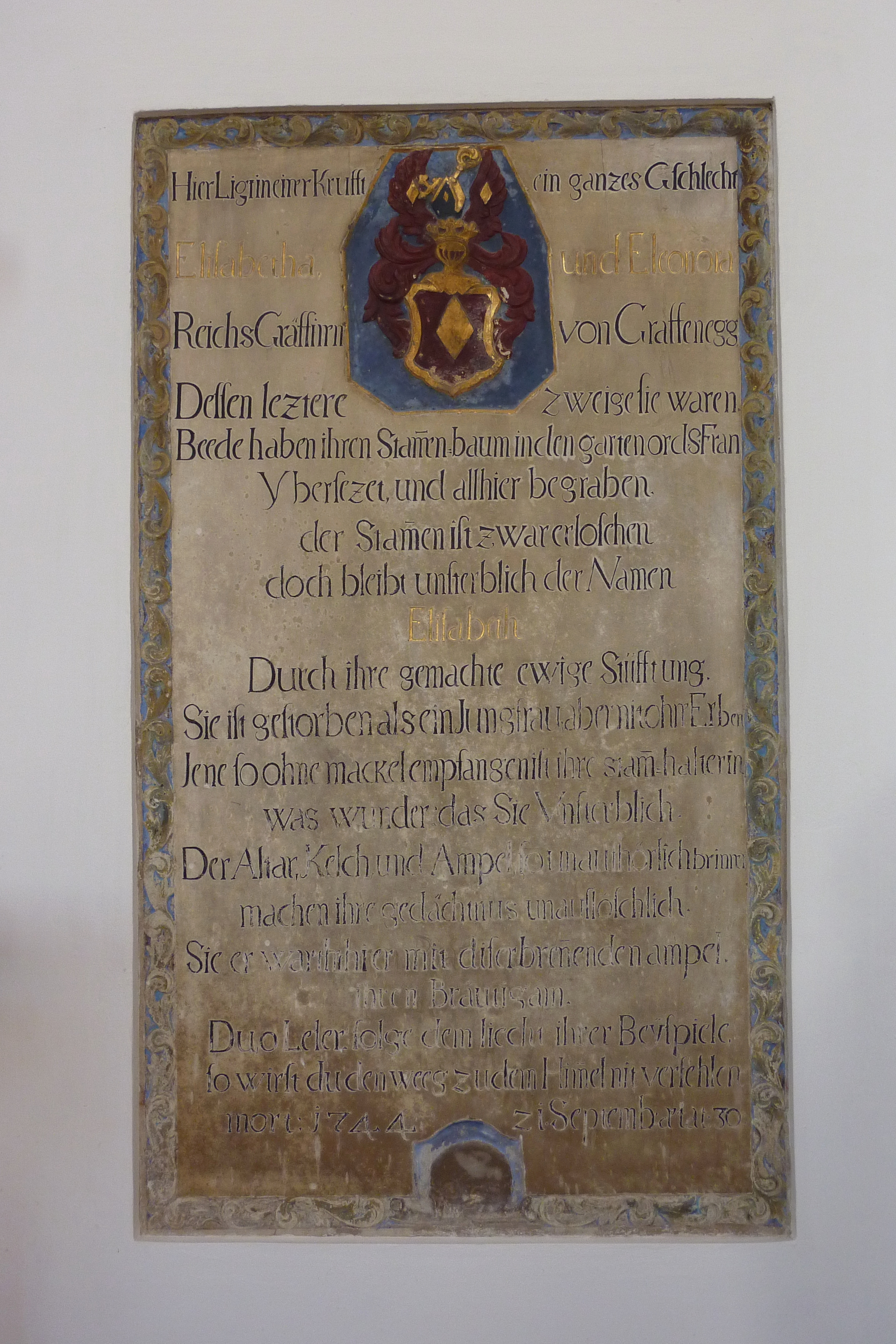 Katholische Kirche Zu Unserer Lieben Frau in Günzburg (Bayern), Grabplatte Elisabeth und Eleonora von Grafeneck (die letzten ihres Geschlechts)